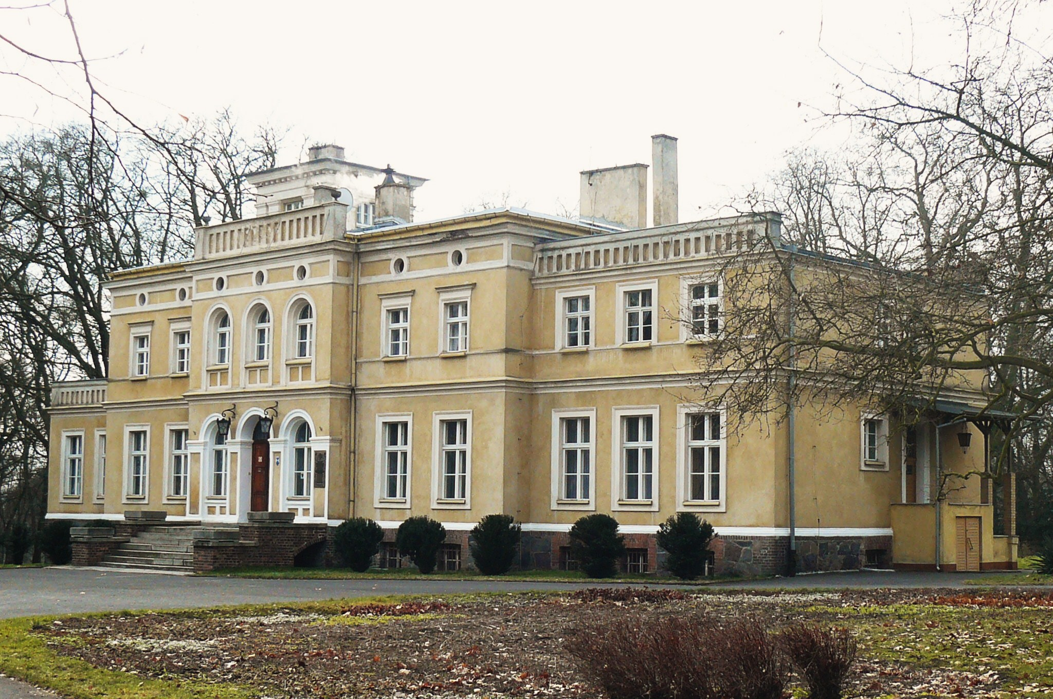 Pałac-Muzeum w Uzarzewie.